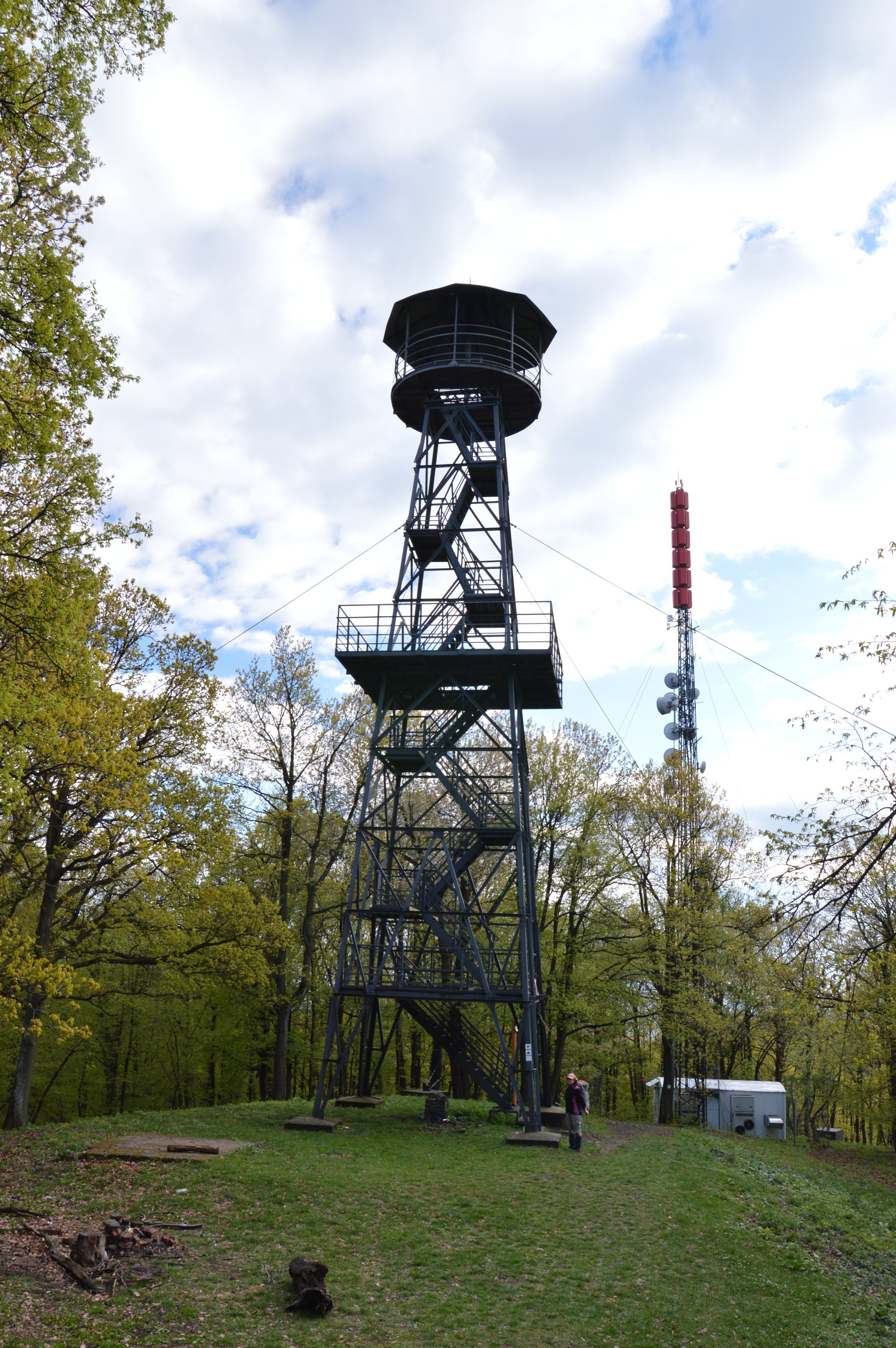 Vrch Karanč, rozhledna už je postavena na maďarské straně